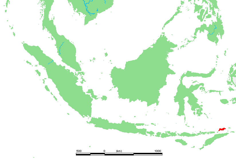 ID Tidore.PNG